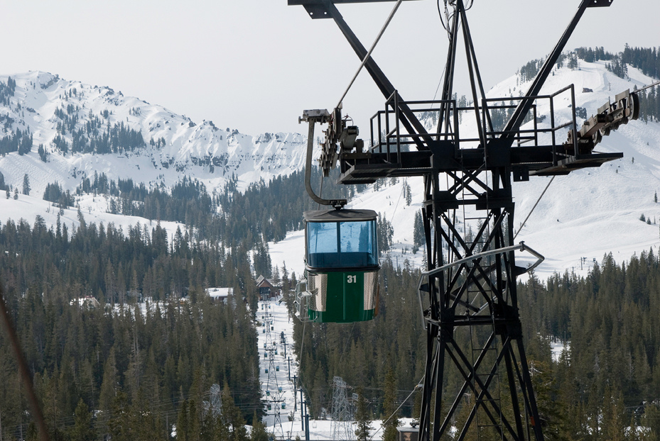 Sugar Bowl Ski Resort Gondola